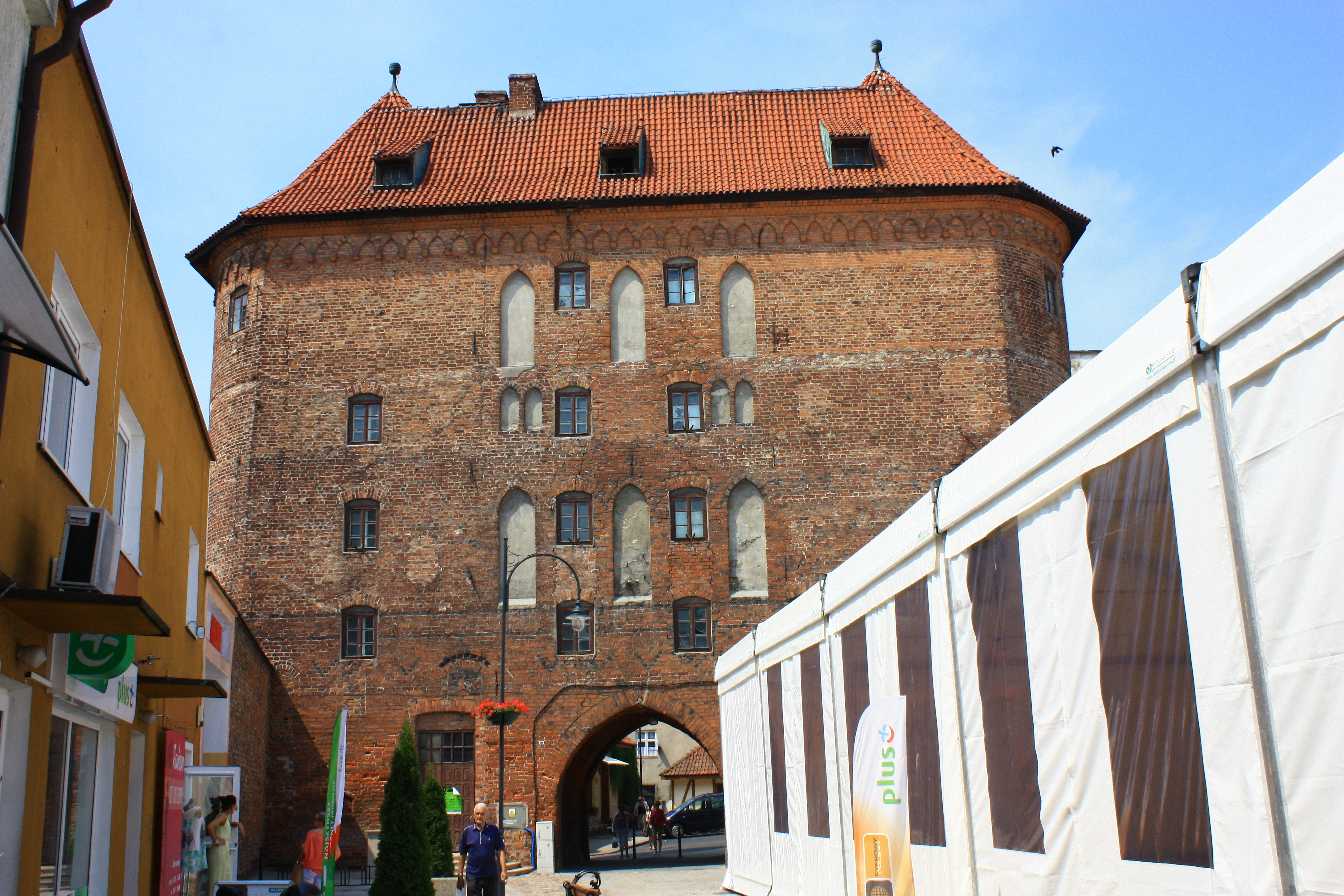 Lidzbark Warmiński, Wysoka Brama, XIV